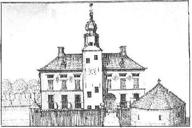 Ewsum of De Oort, voormalige borg bij Middelstum. Eerste vermelding 1371. In 1863 gesloopt op de gevechtstoren na. Tekening is van de burcht in oude staat.